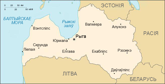 Карта Латвіі